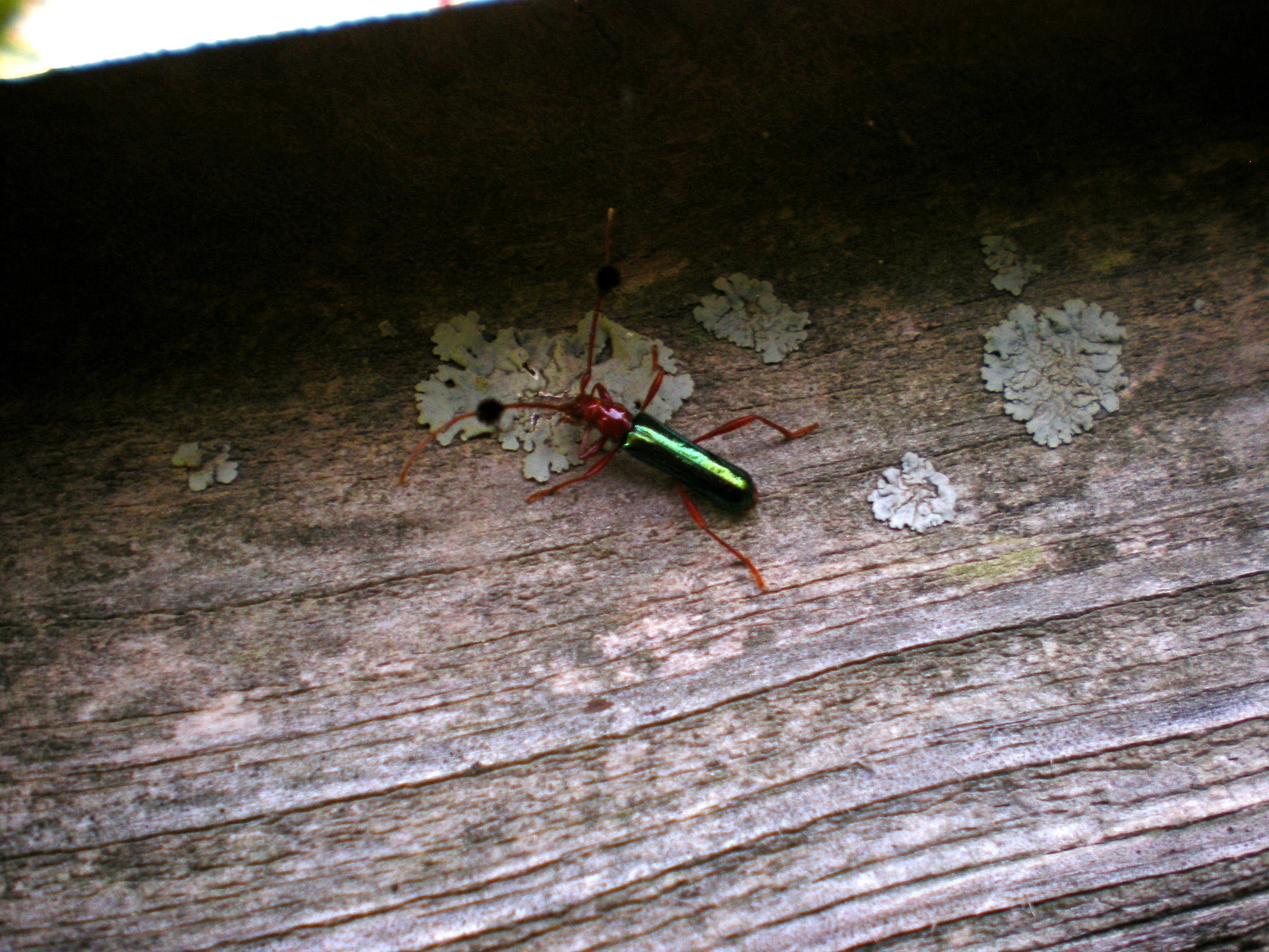 Fotografia de un Guitarrero (Compsocerus violaceus)